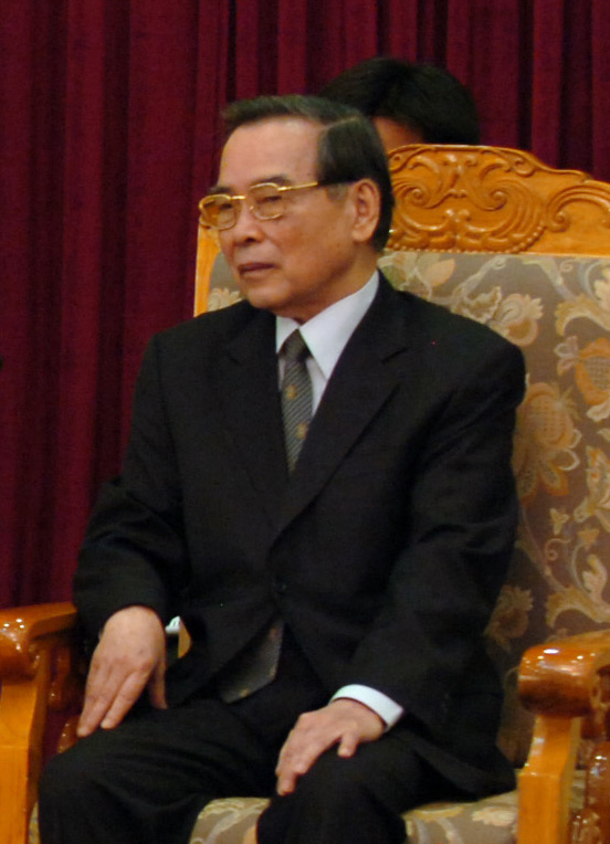 Vietnamese Prime Minister Phan Van Khai in Hanoi, Vietnam, on June 5, 2006.